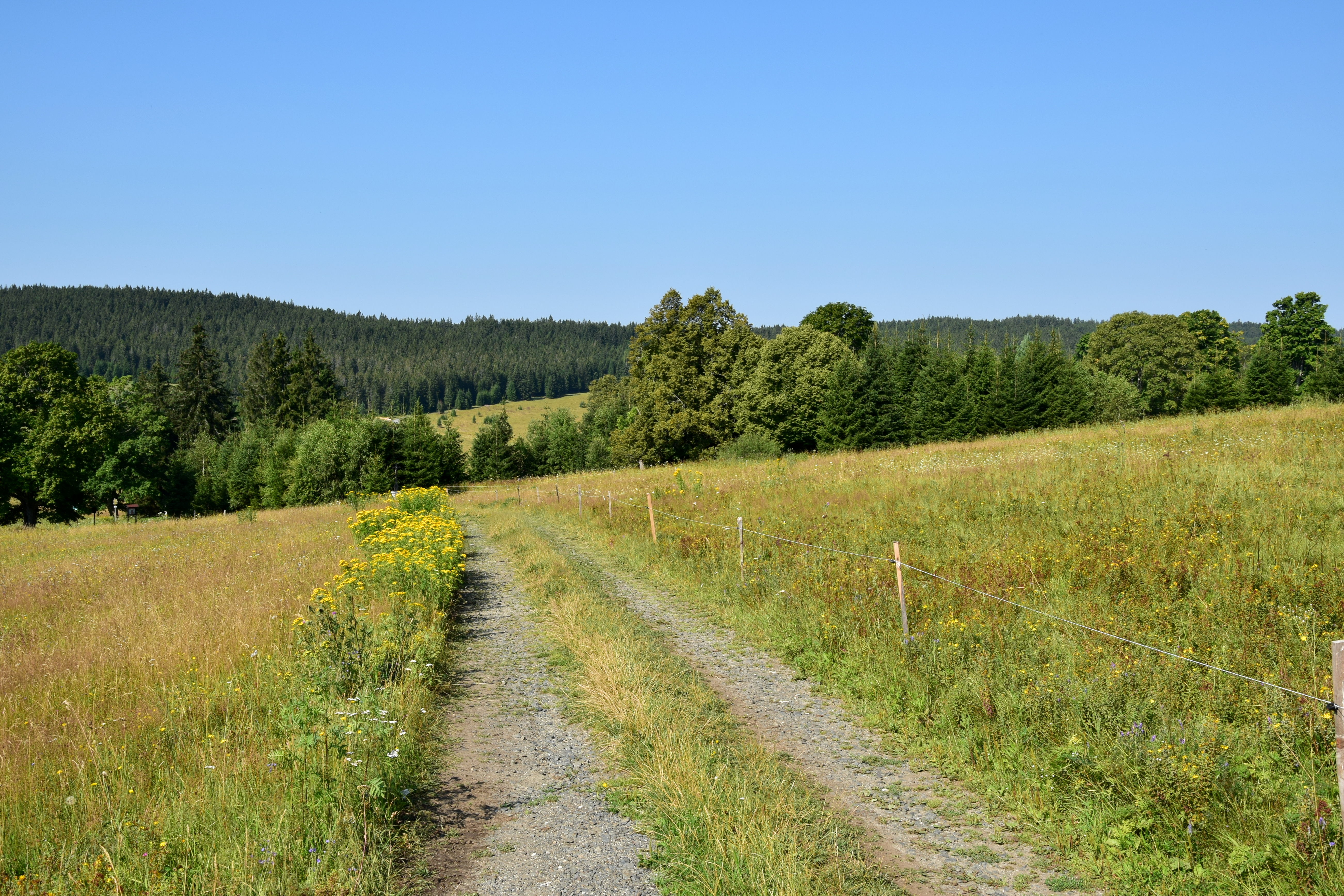 Přírodní rezervace Zhůřská hnízdiště